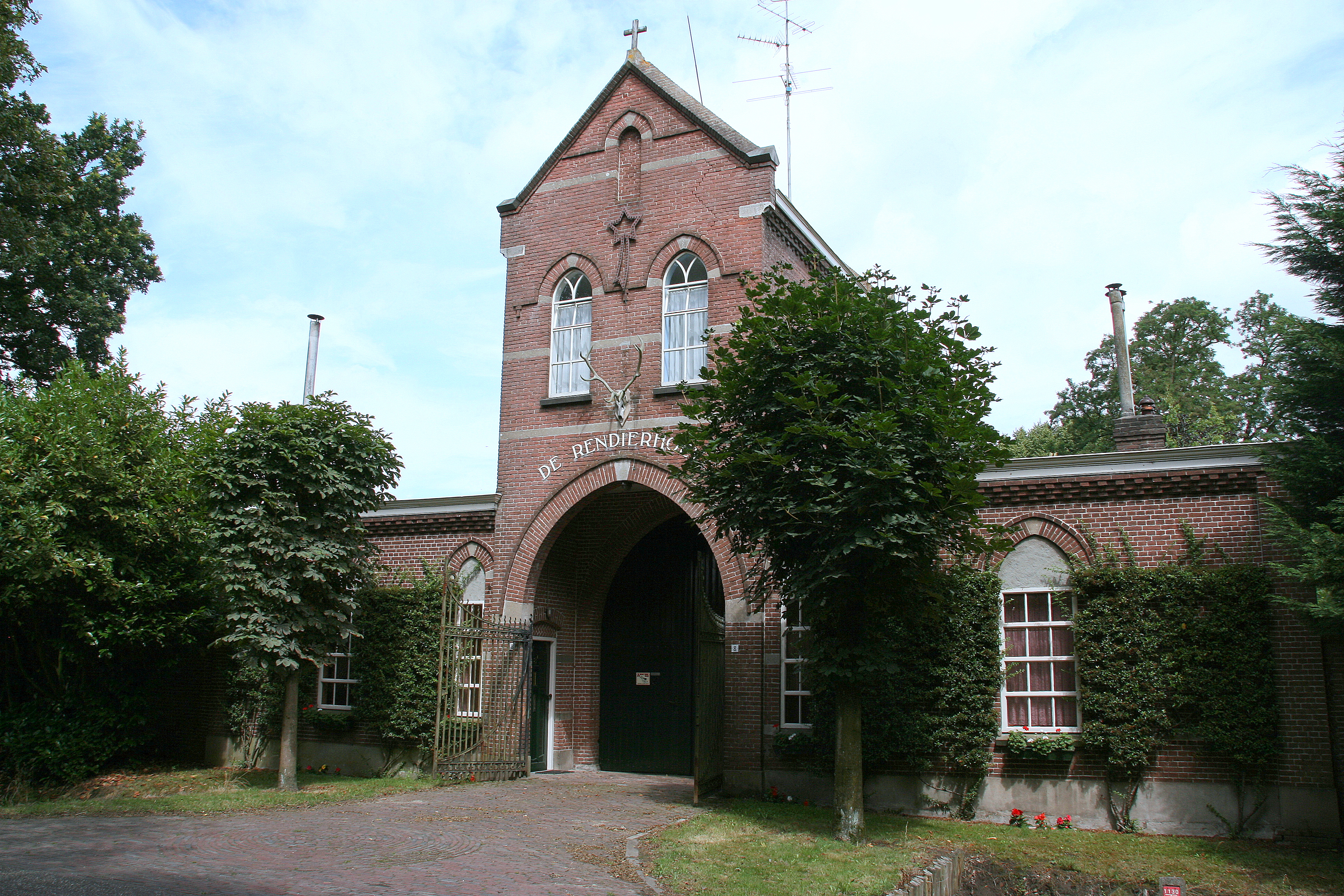 Het hoofdgebouw van het voormalige R.K. klooster Notre-Dame du Perpetuel Secours, thans genaamd "De Rendierhoeve', werd kort na 1903 door abt Verbruggen van de nabij gelegen abdij Koningshoeven gebouwd in Neo-Gotische stijl. Het blijkt wel lang geleden, dat verdreven Franse nonnetjes hun contemplatieve leven achter deze hoge muren tot bloei poogden te brengen. Tot 1912 hebben de Trappistinnen op de Koningshoeven gezeten.